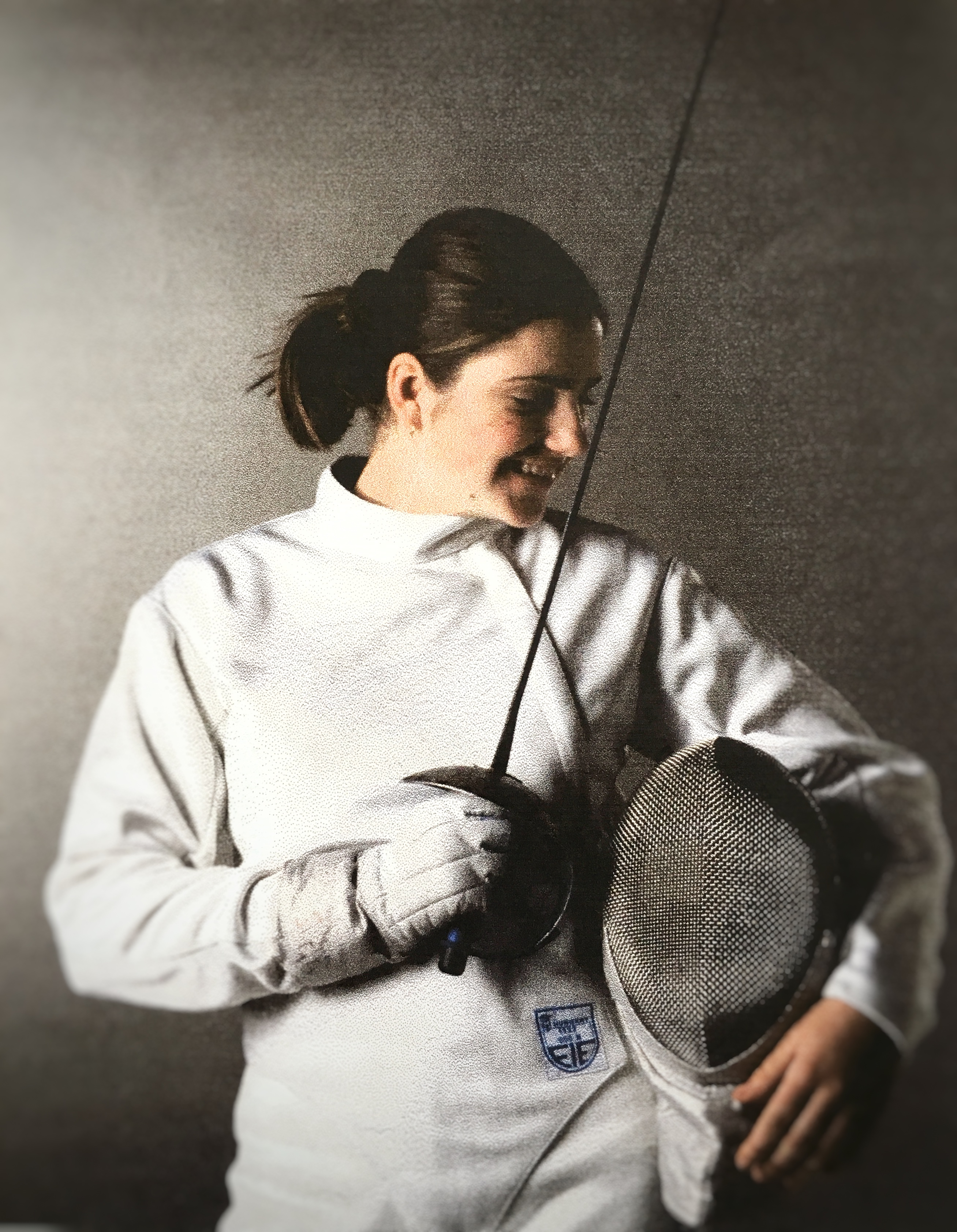 Gergácz Veronika, vívó öltözékben